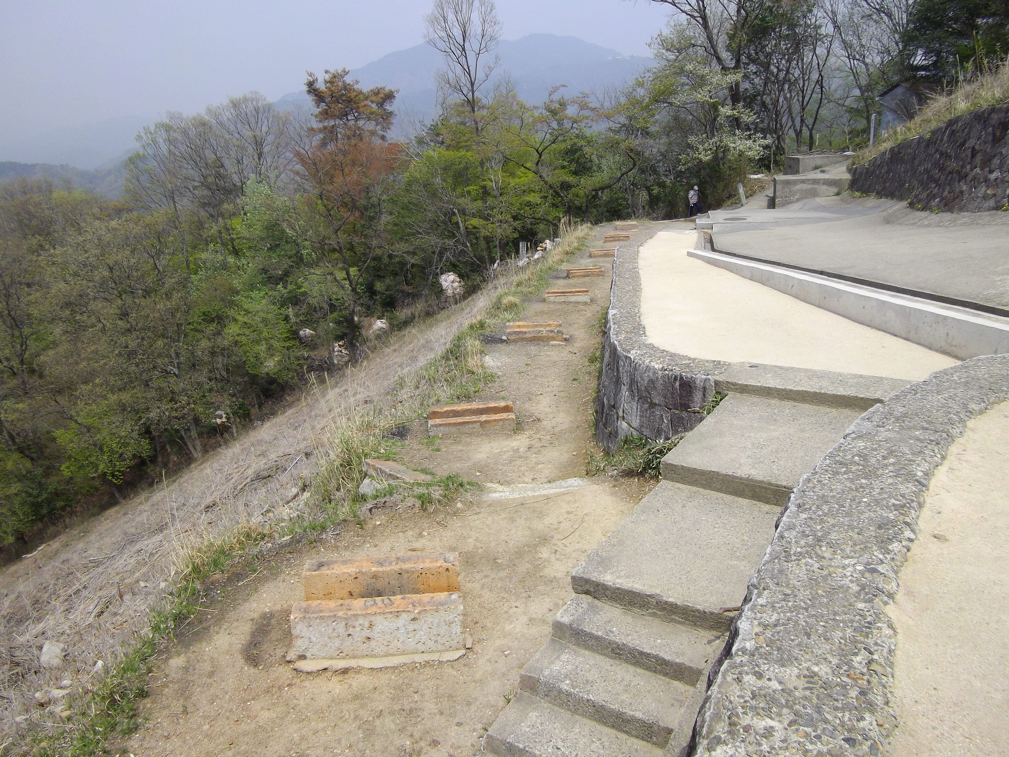 大文字、第1画。金尾より北方向を望む。登山道から火床へ登ってきた人が見える。